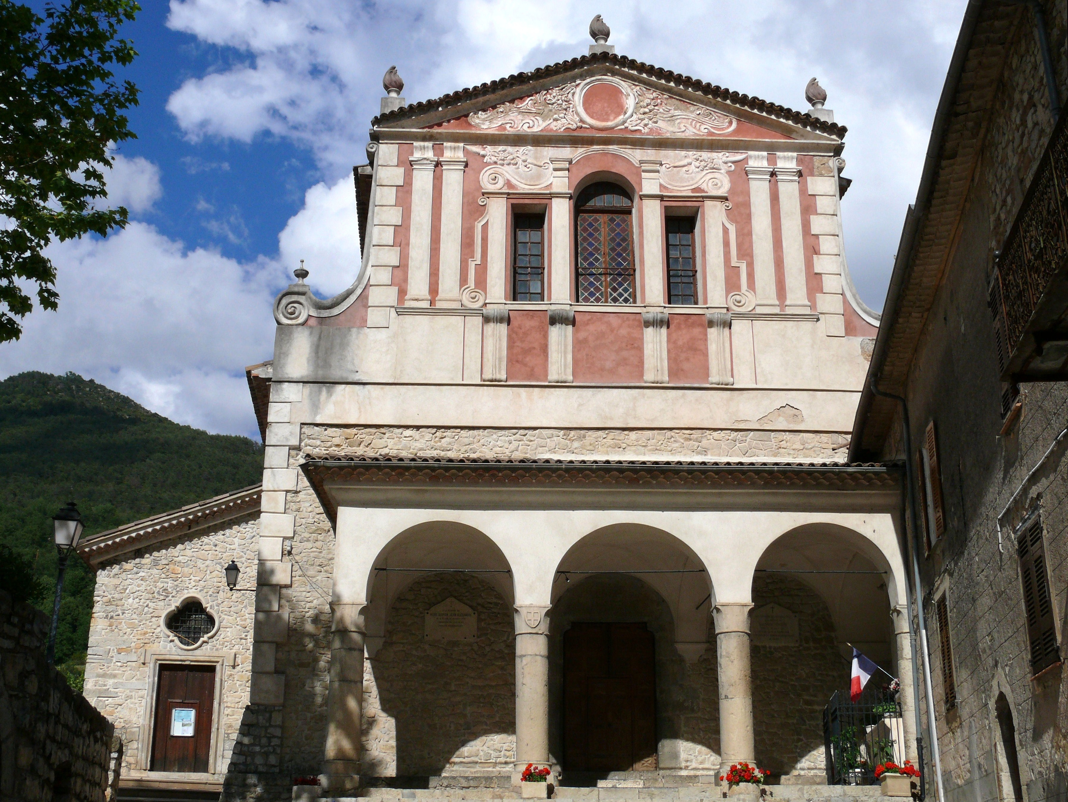 Clans (Alpes-Maritimes) - Collégiale Sainte-Marie